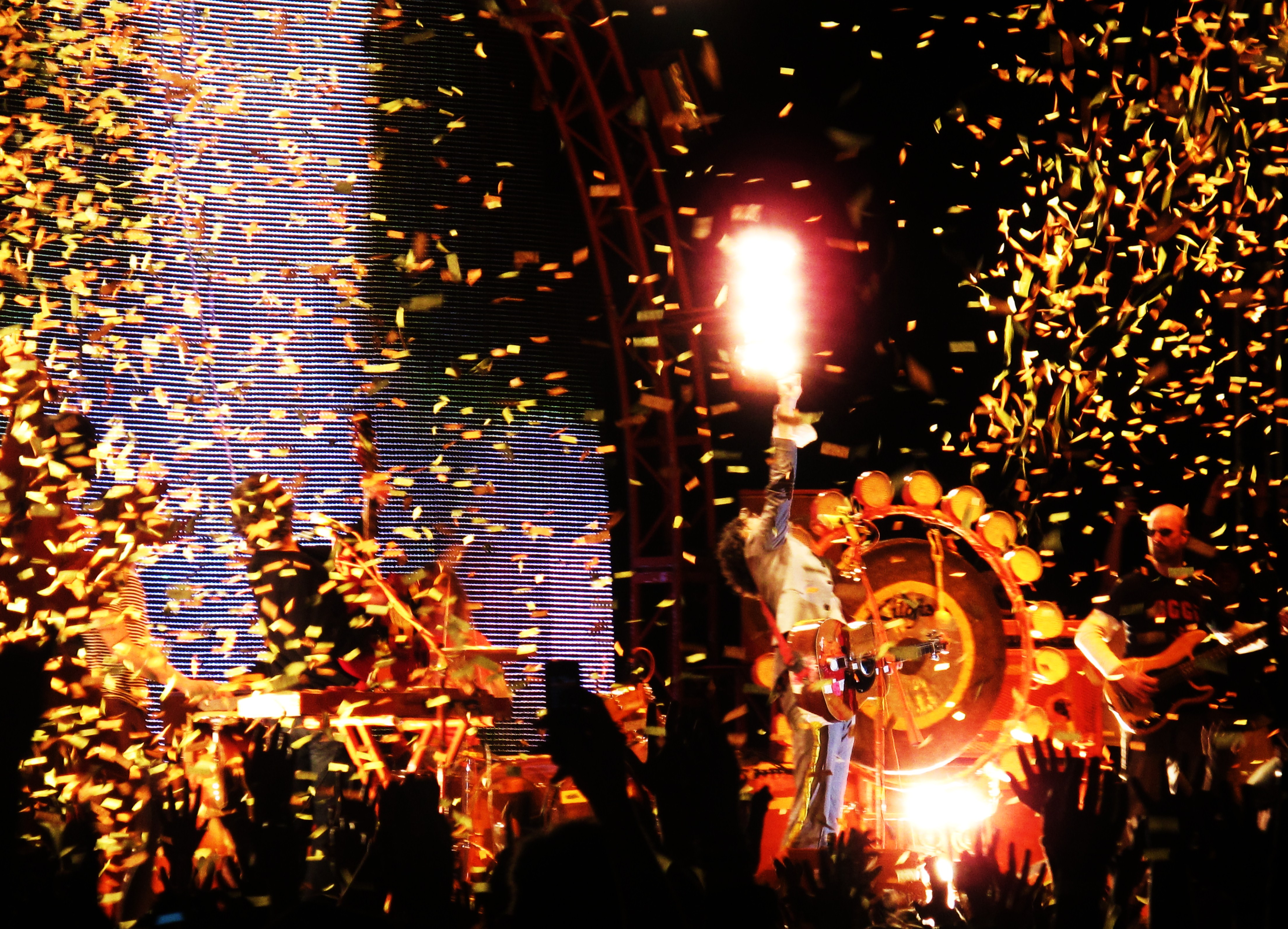 Flaming Lips at NX35 2010